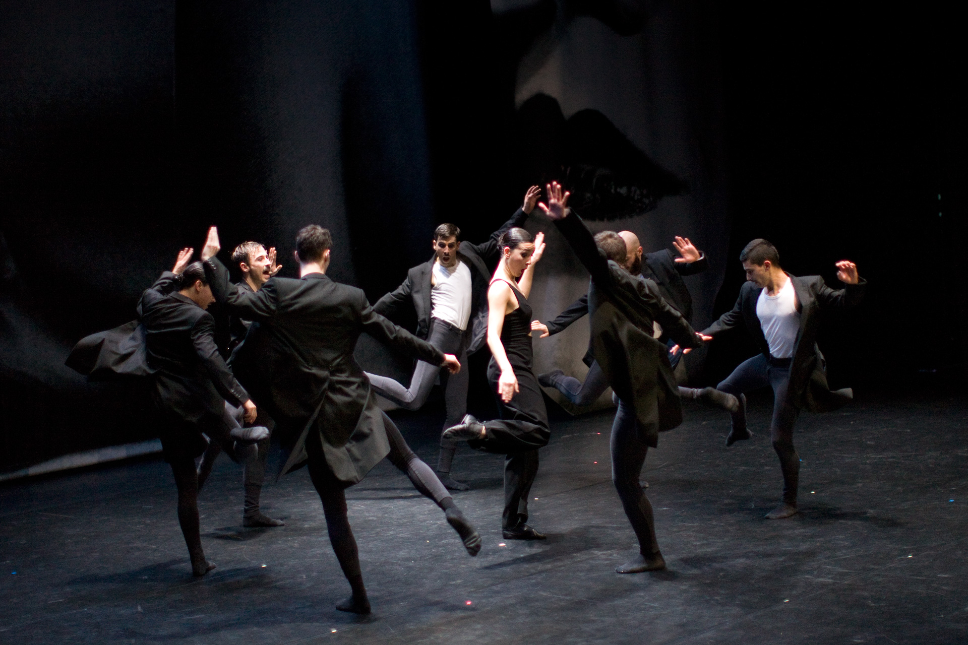 dFERIAko martxoak 7ko ikuskizunak/ espectáculos del 7 de marzo de dFERIA. Argazkiak / fotografias: Gorka Bravo para Donostia Kultura dFERIA 2018